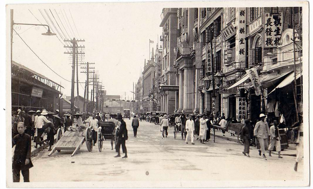 1930年代，廣州市西堤。